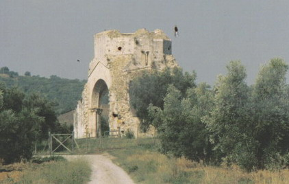 descrizione: Ruderi del Monastero di San Bruzio presso Magliano in Toscana (GR) lavoro personale di Vinattieri Matteo (26/01/2007) che lascia in pubblico dominio